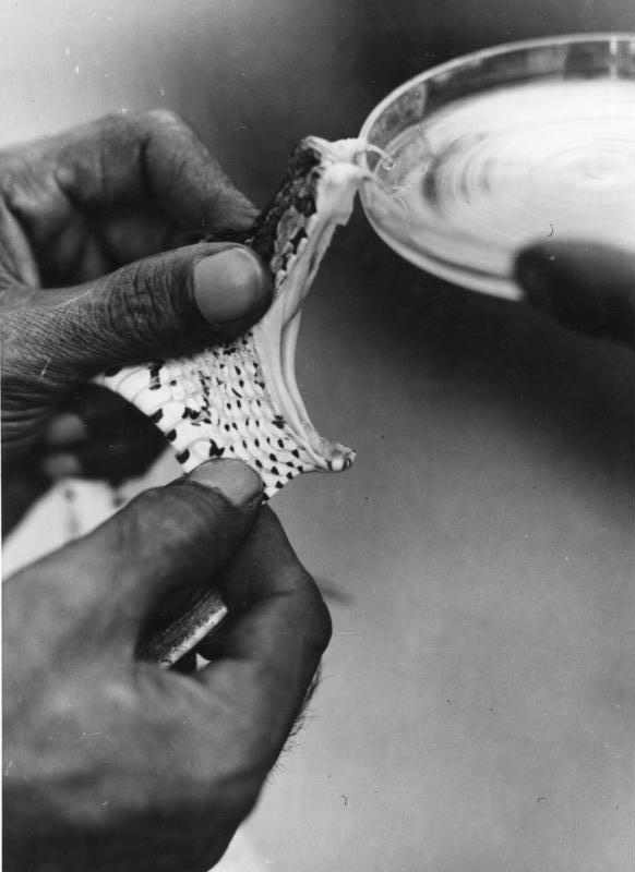 Tibetexpedition, Melken einer Schlange Kalkutta, Giftentnahme